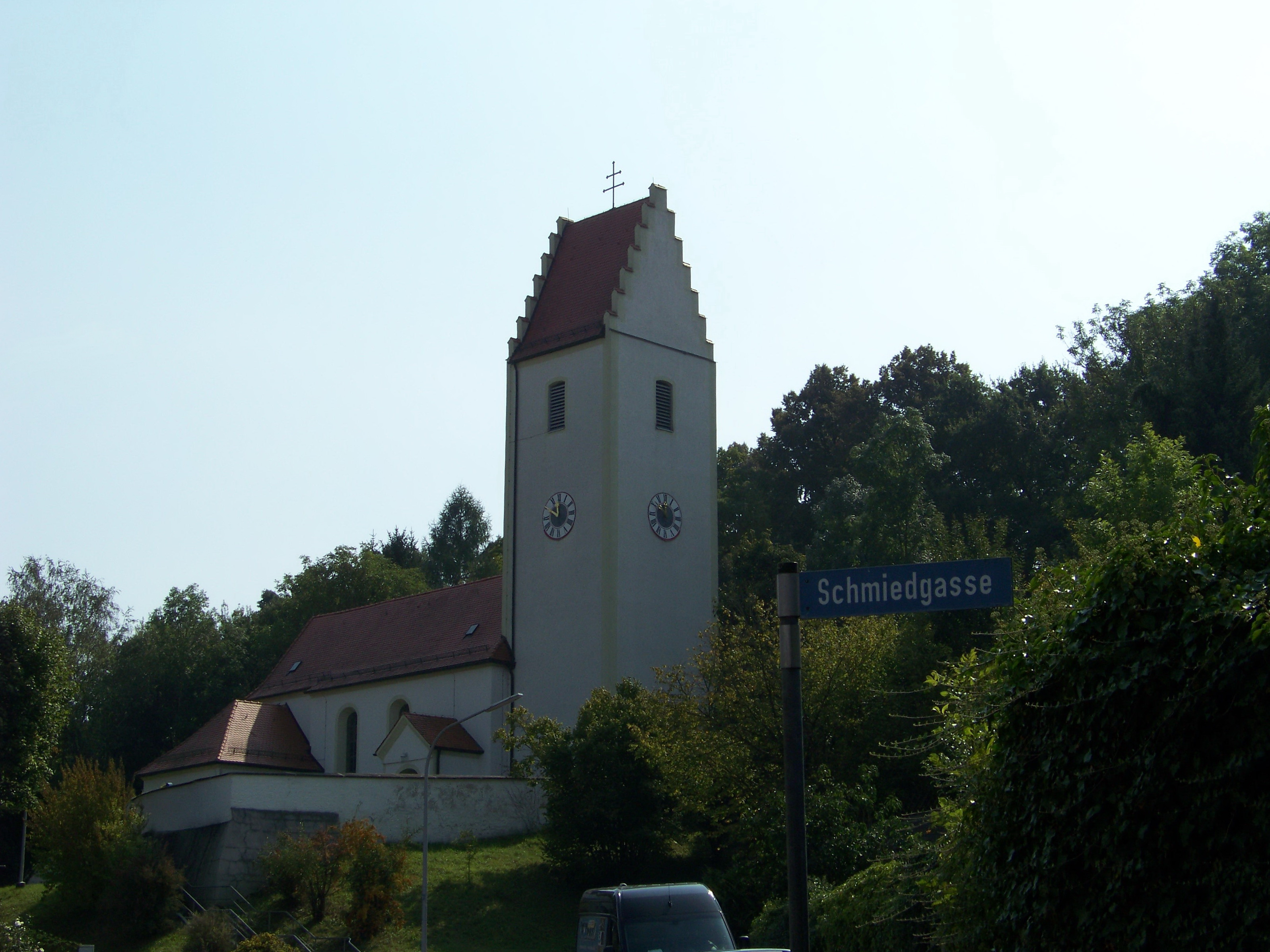 Thalmassing, Wolkering, Kirchbergstraße 11. Kath. Pfarrkirche Mariä Himmelfahrt. Saalbau mit eingezogenem Chor und westlichem Fassadenturm mit Treppengiebel, 1746, Turm gotisch; Friedhofsmauer mit korbbogigem Portal, 18. Jahrhundert; jüdischer Grabstein für Barsilai, Kalkstein, 1292